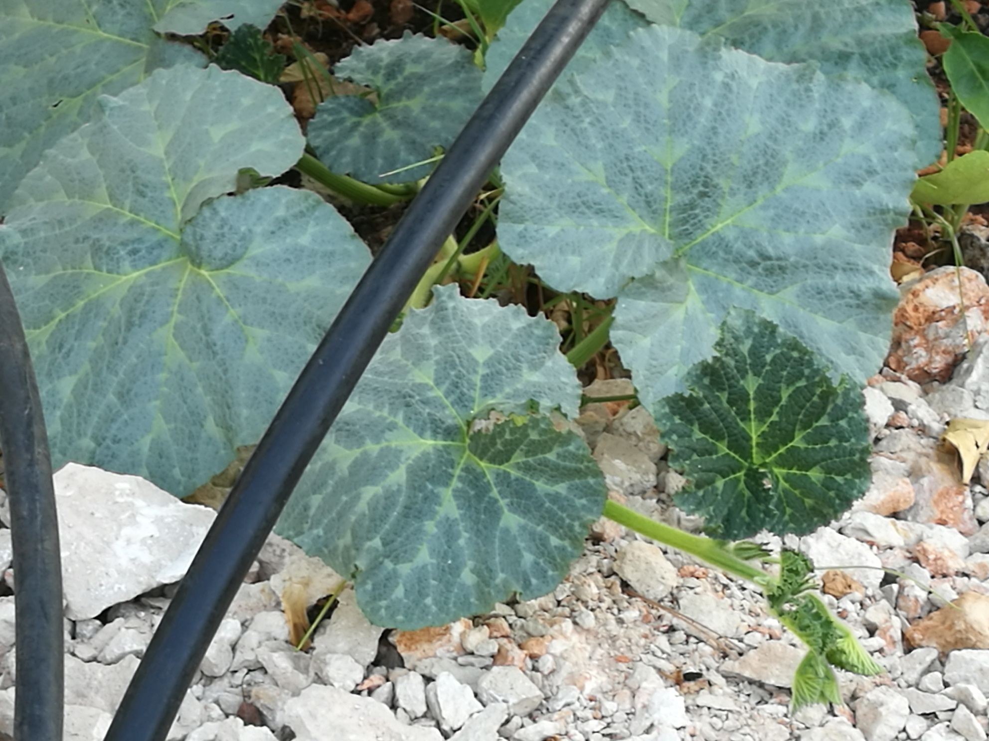 שיח הדלורית